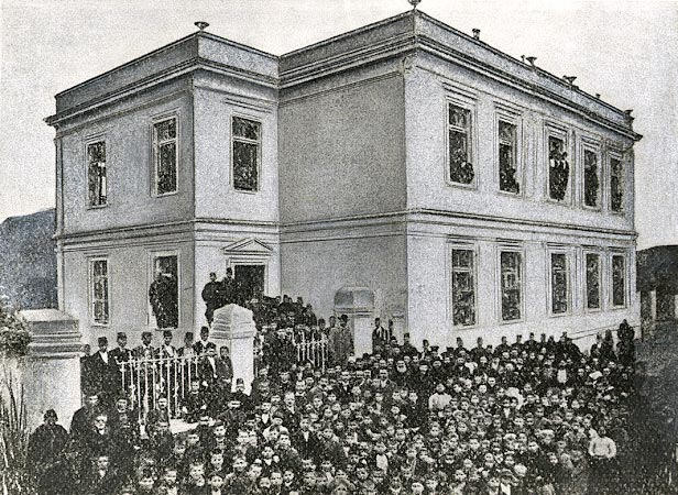 Гръцкото училище Цуфлия в Гевгели в началото на 20 век.